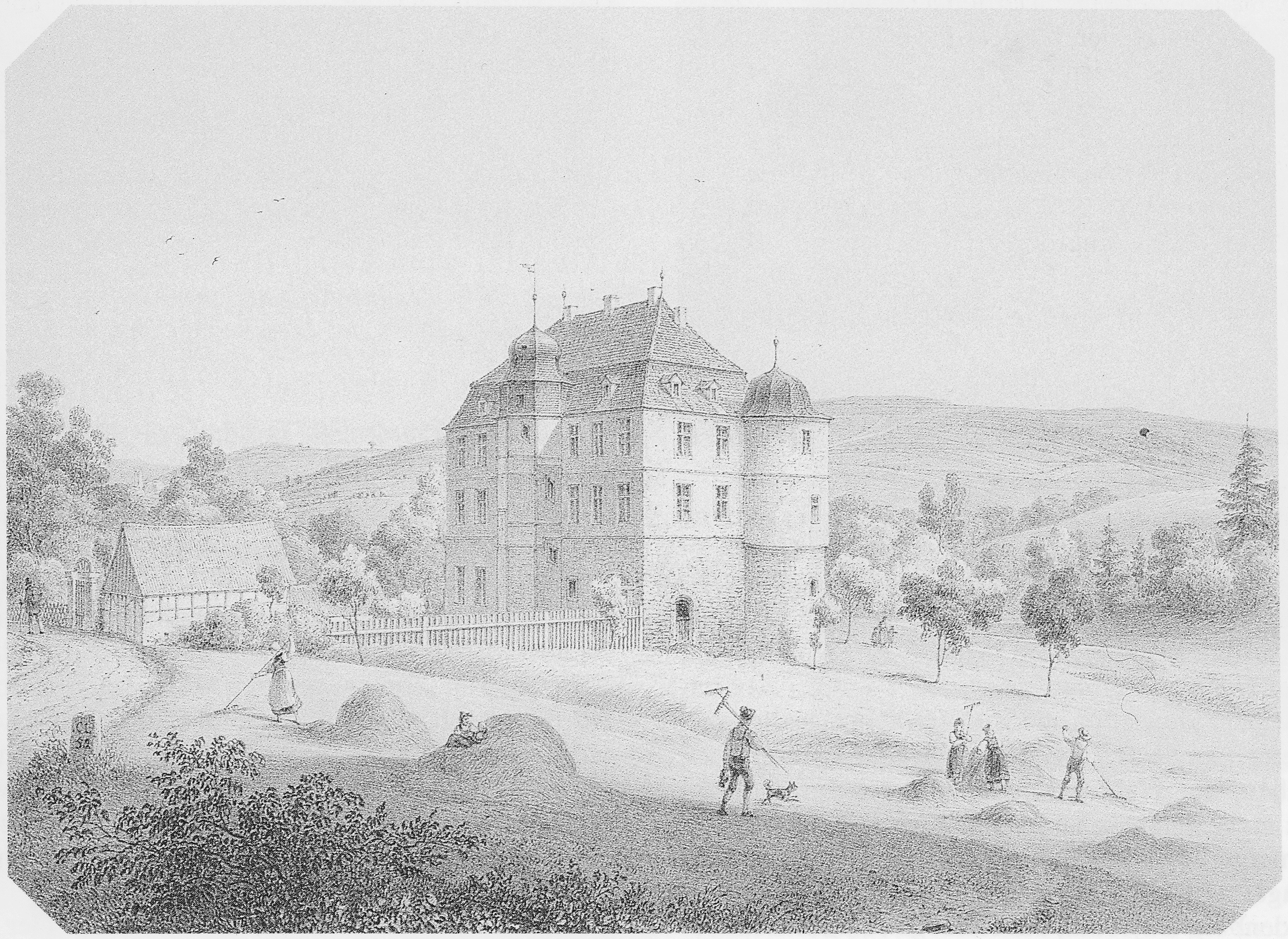 Burgruine Niesten, Aquarellierte Zeichnung aus dem Jahr 1835 von Carl August Lebschée (1800-1877)